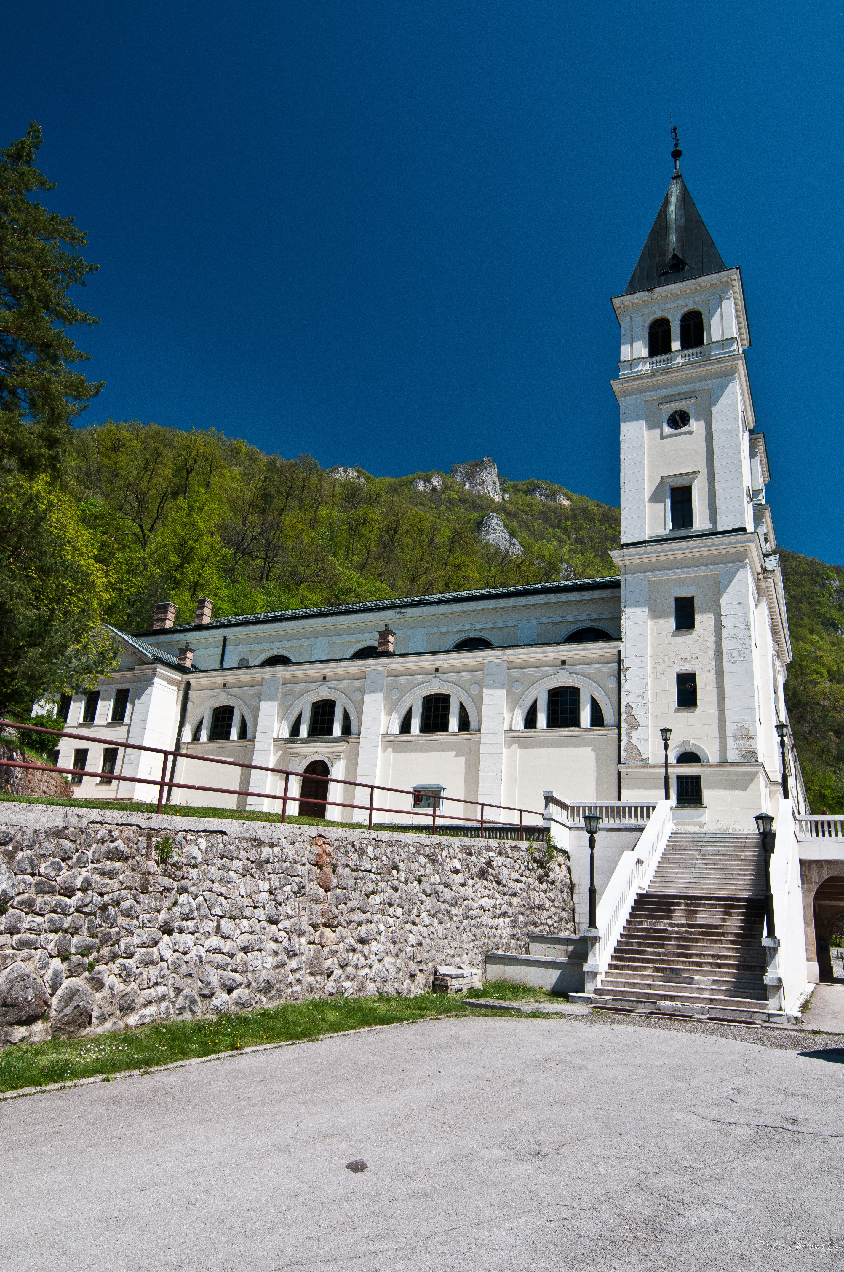 Bosnia and Herzegovina Apr-30-2012 045